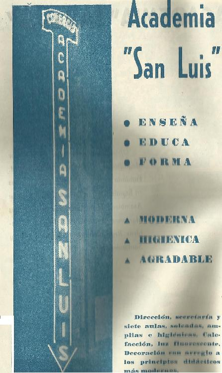 Anuncio con el cartel de neón de la famosa y ya extina Academia "San Luis" de Palencia (años 40 y 50 del siglo XX).